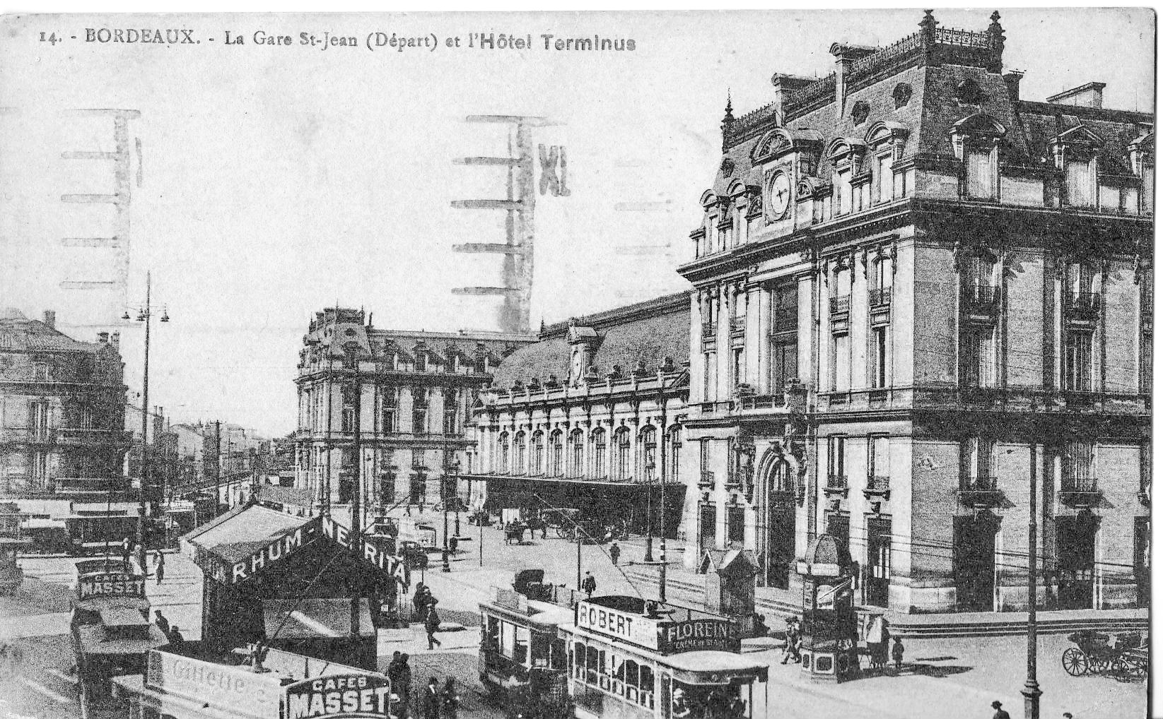 Carte postale ancienne éditée par La Cigogne, n°14 : BORDEAUX - La Gare Saint-Jean